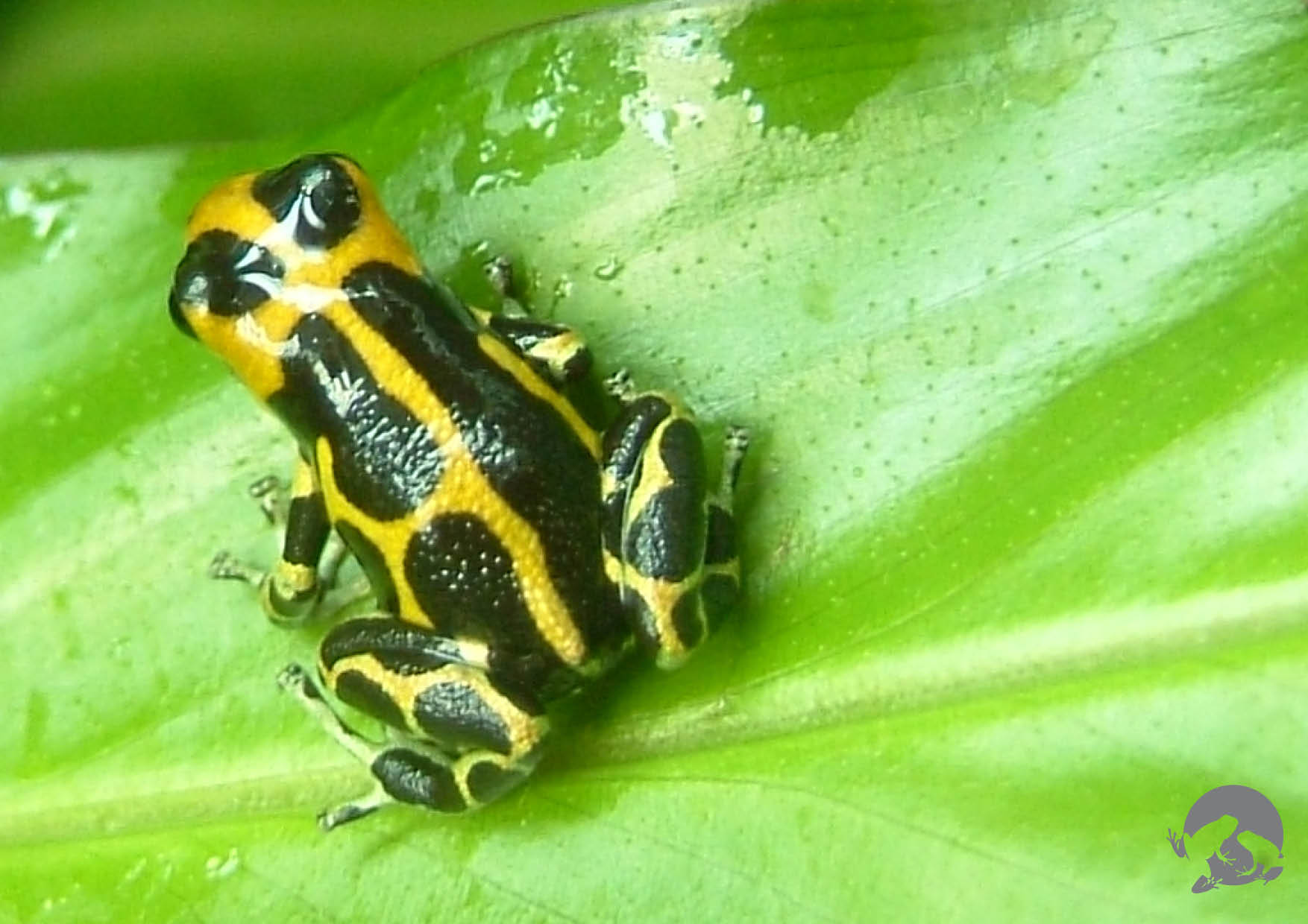 R. imitator "Chazuta", männliches, ausgewachsenes Tier